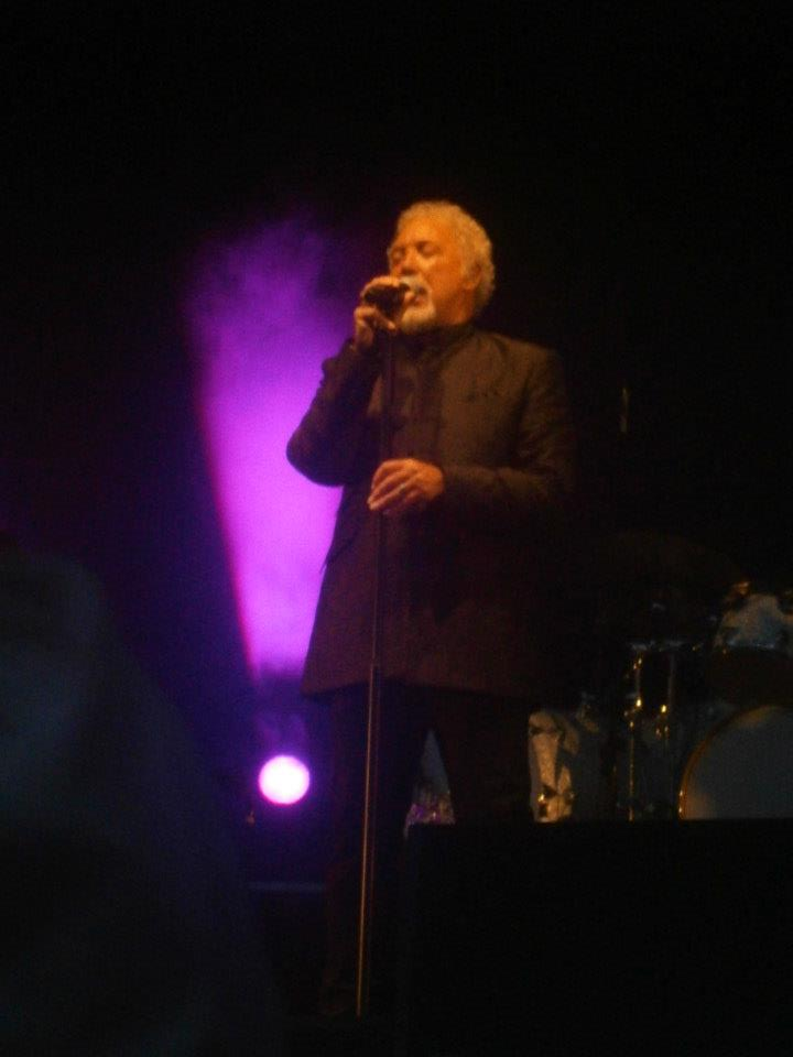 Tom Jones vuonna 2012 Turun Linnan Juhlilla